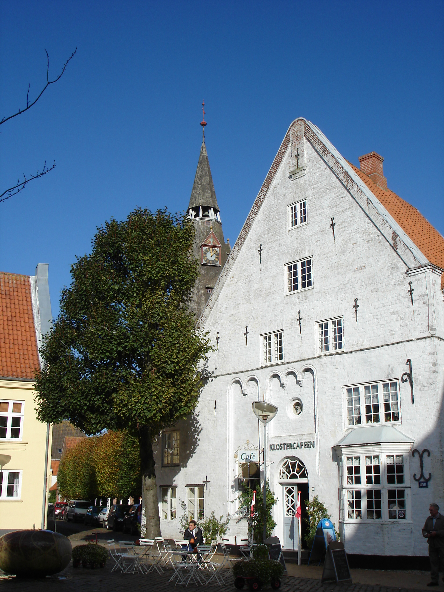 Tønder (Tondern), South Denmark